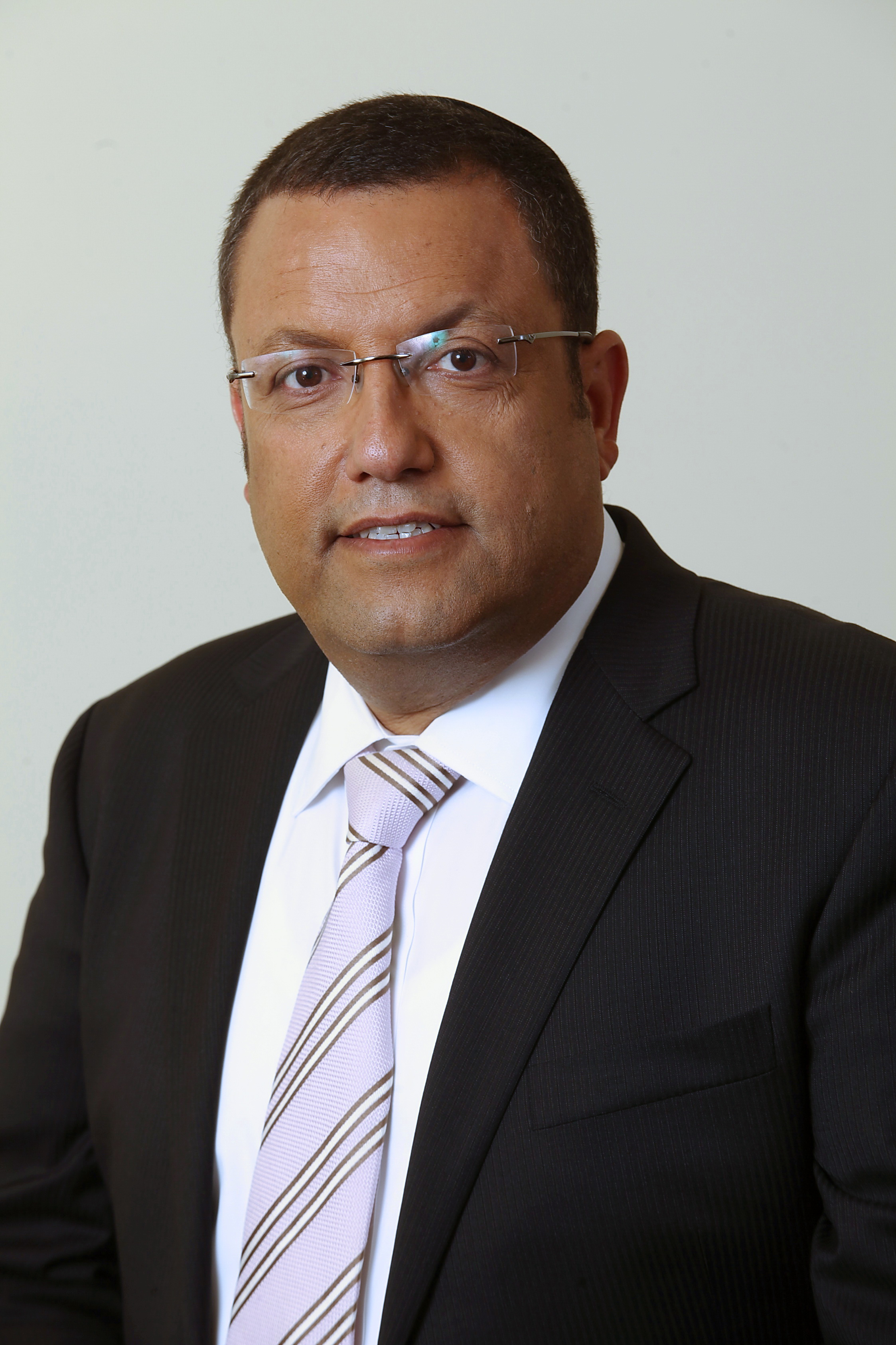 משה ליאון.